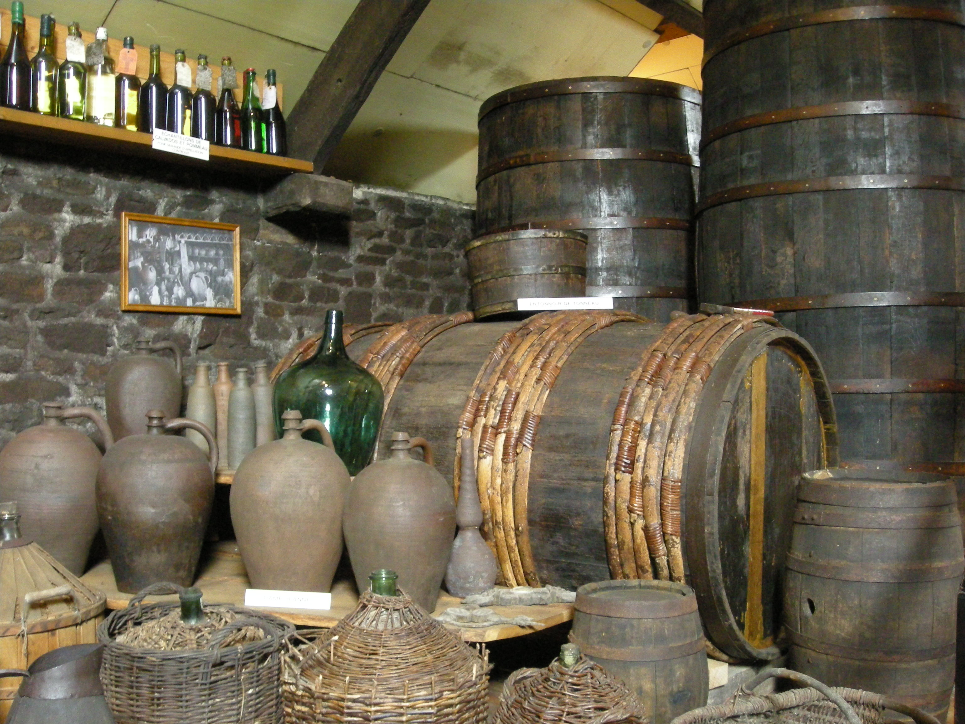 Une cidrerie à Saint-Jean-des-Champs, département de la Manche, Normandie)